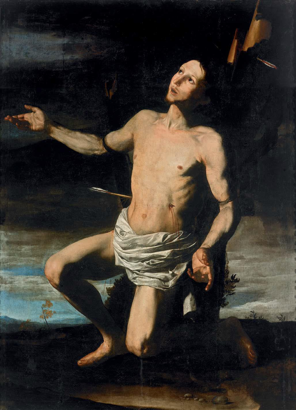 La obra representa el martirio de San Sebastián.